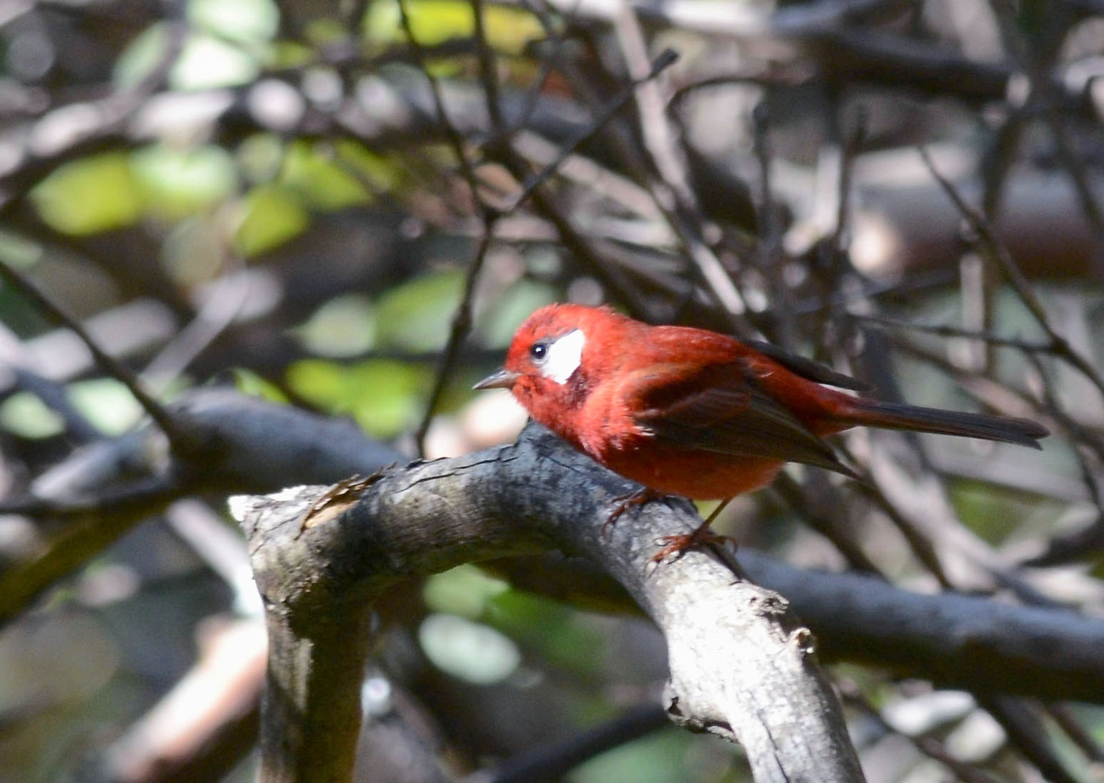 Tepoztlán, Morelos, México